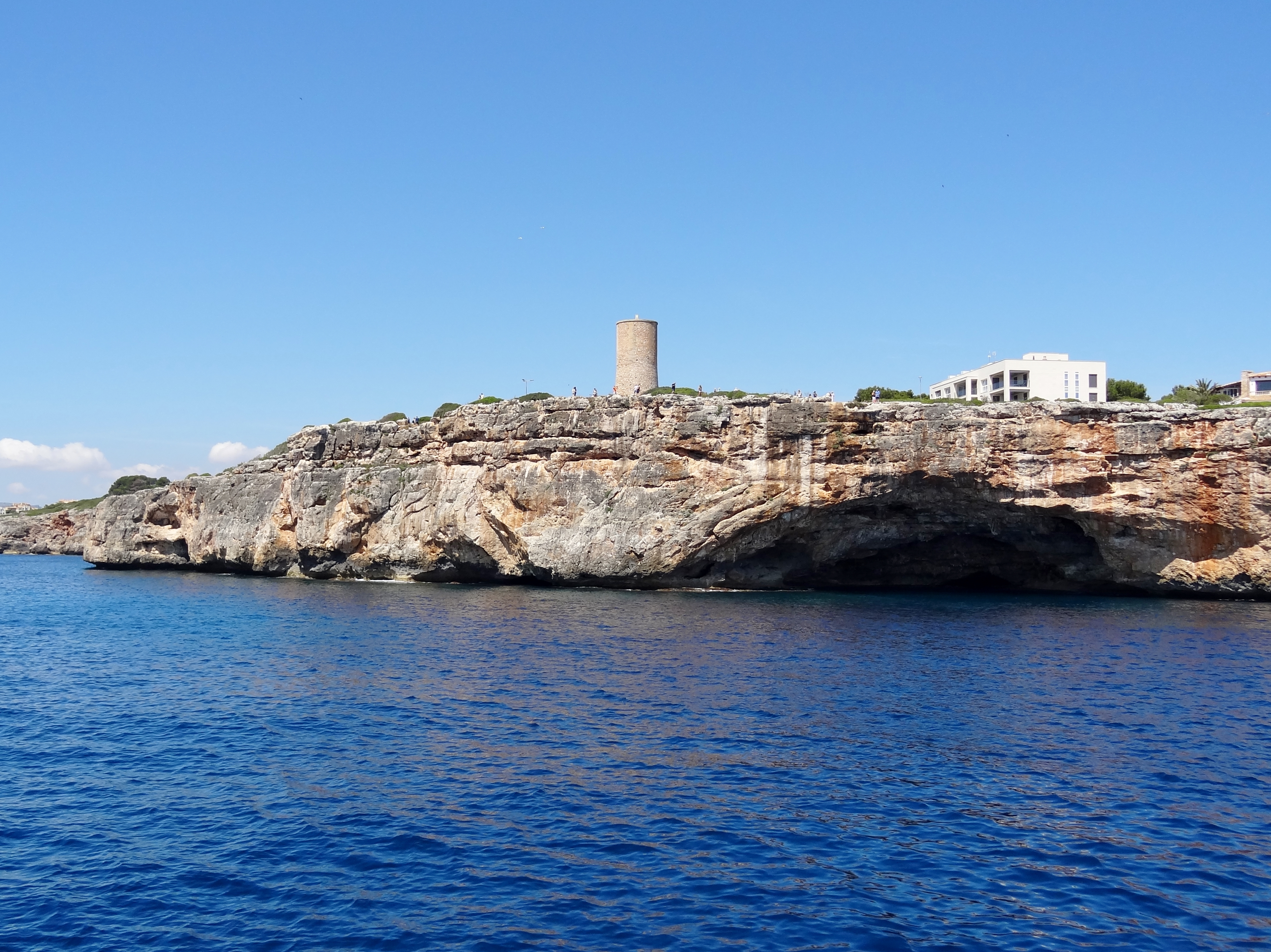 Torre del Serral dels Falcons in der Gemeinde Manacor, Mallorca, Spanien